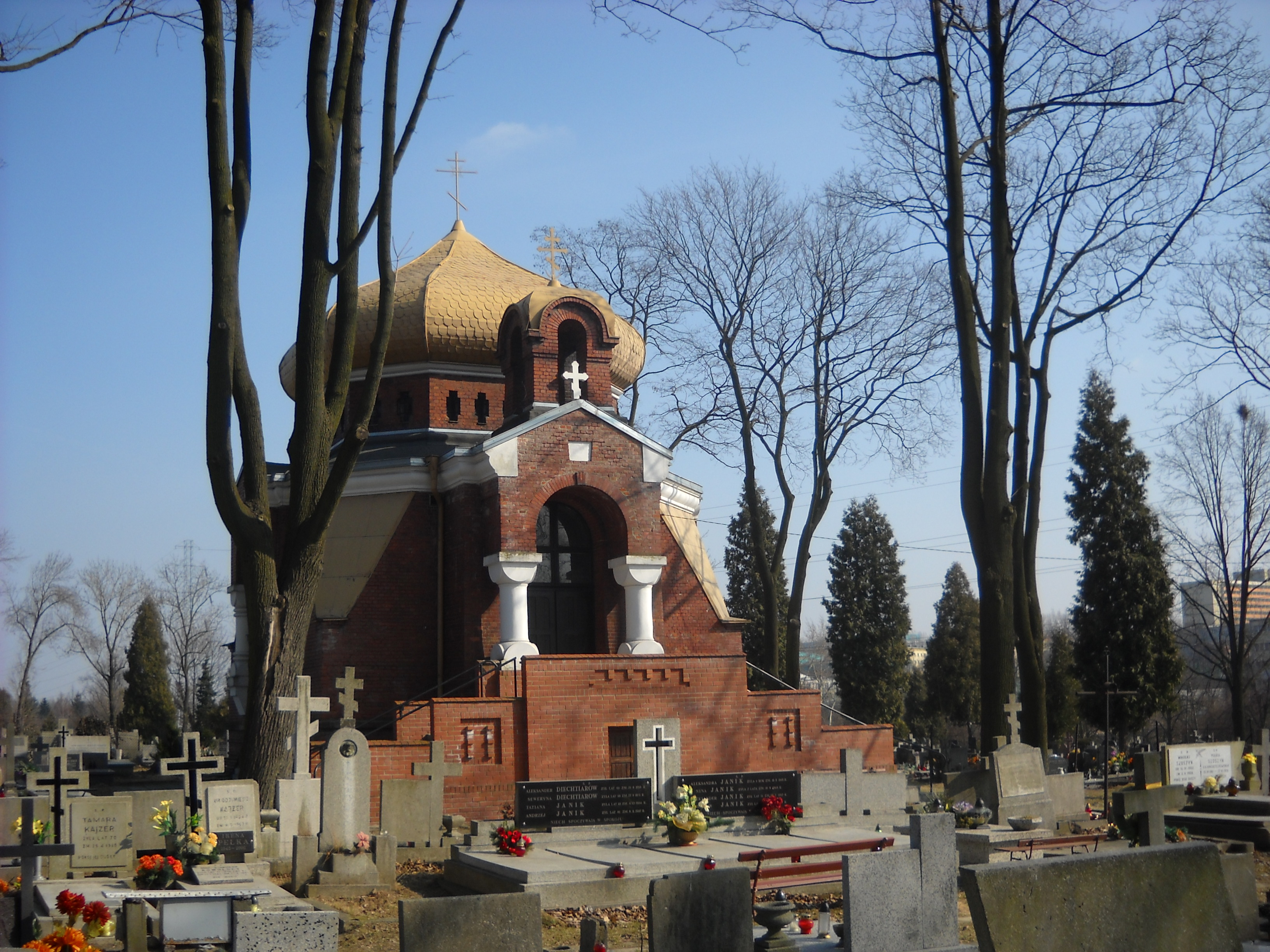 Cerkiew Zaśnięcia Matki Bożej w Łodzi